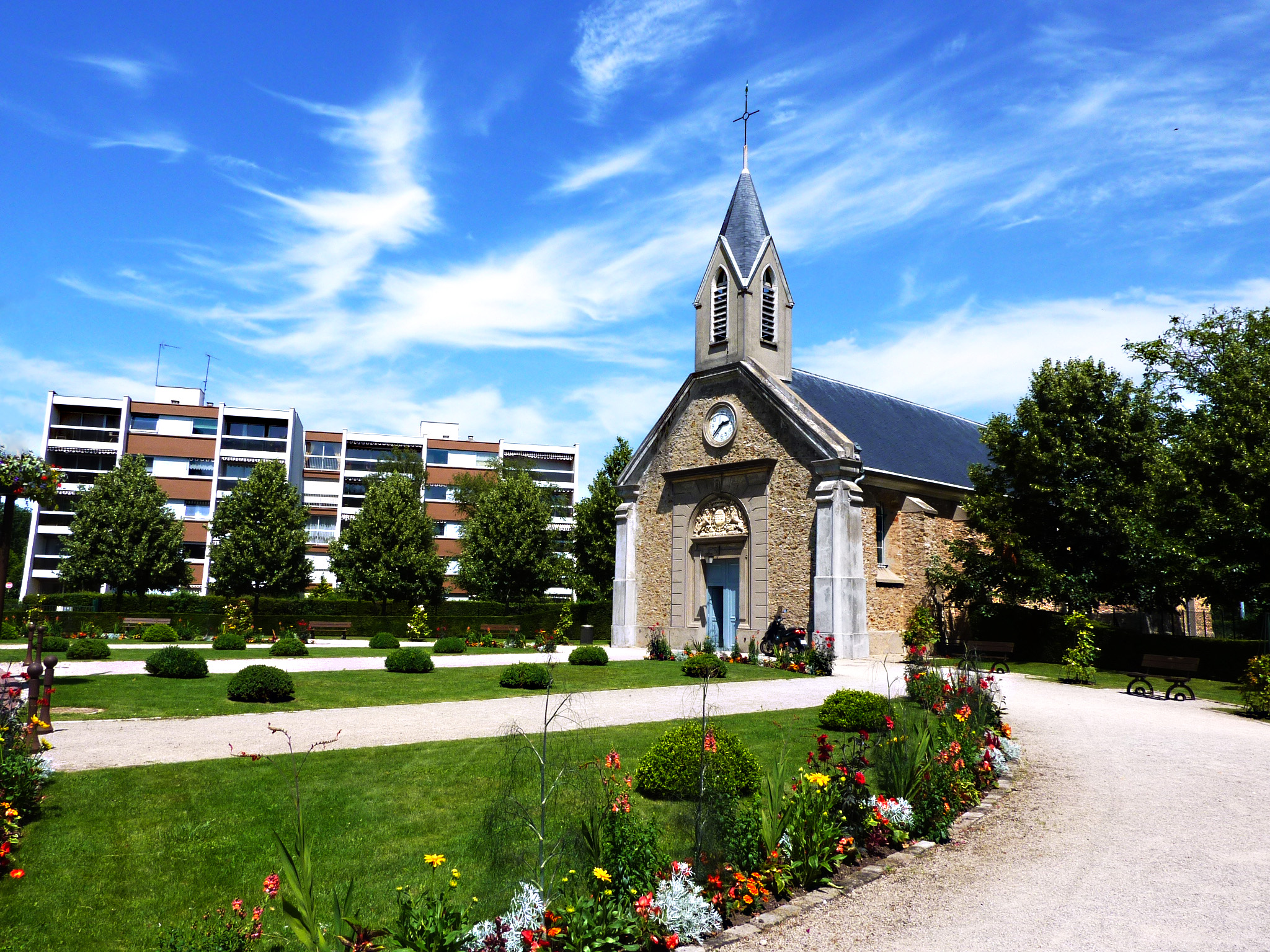 Église Saint-Denis de Vélizy-Villacoublay (Yvelines, France)